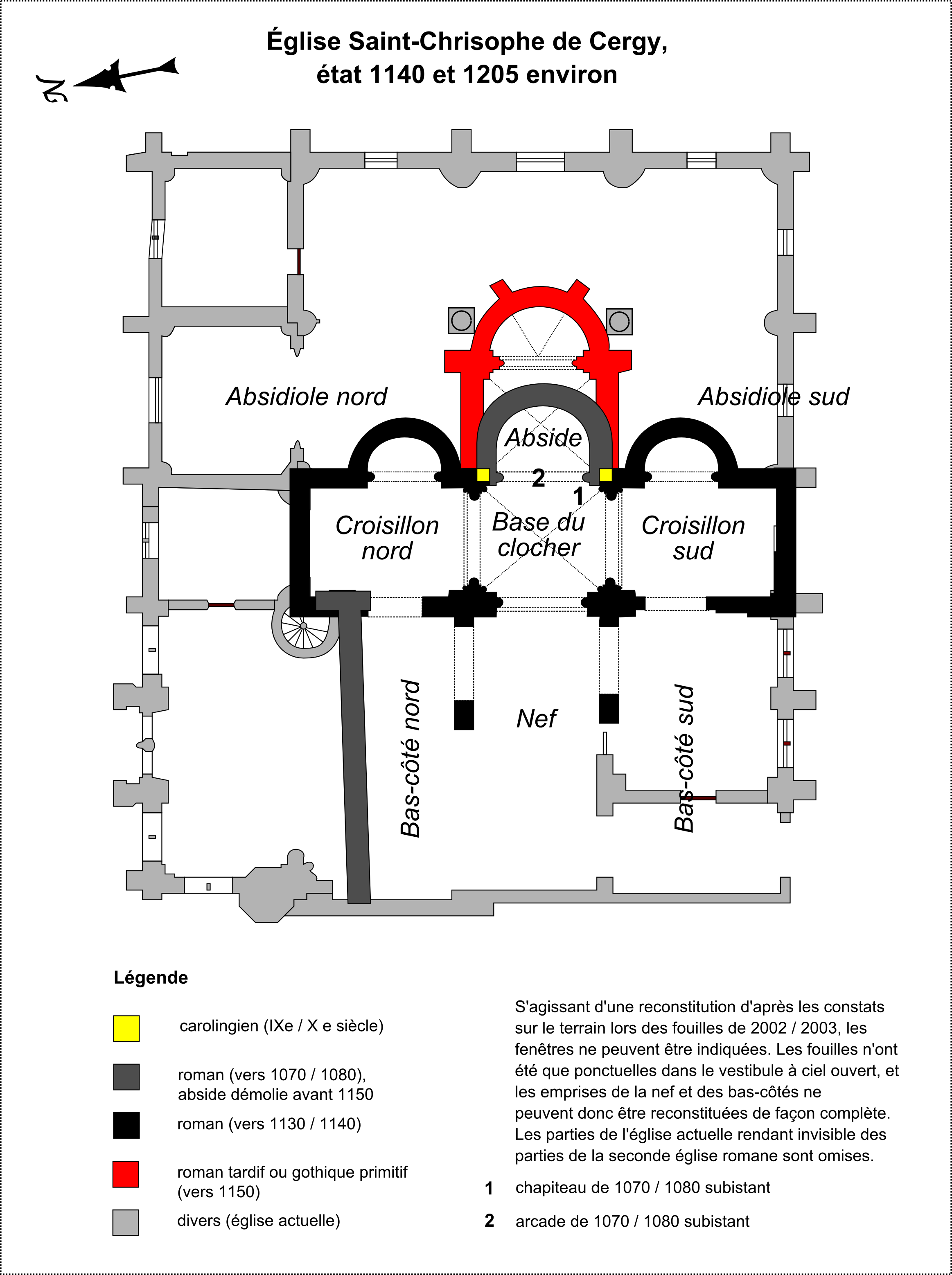 Plan de la seconde église romane de 1130 / 1140 avec le nouveau chœur bâti vers 1150.